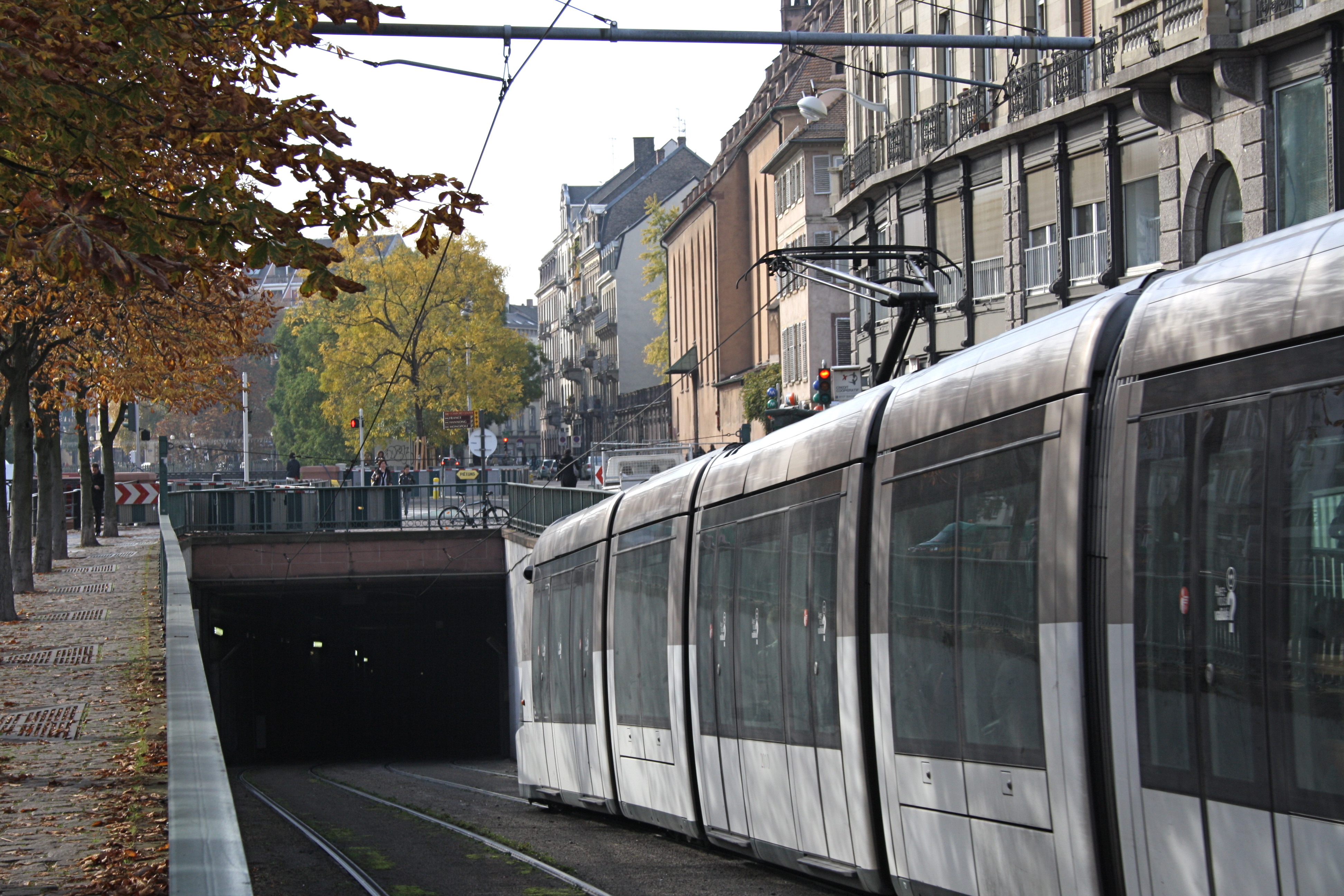 Strasbourg Quai Kléber